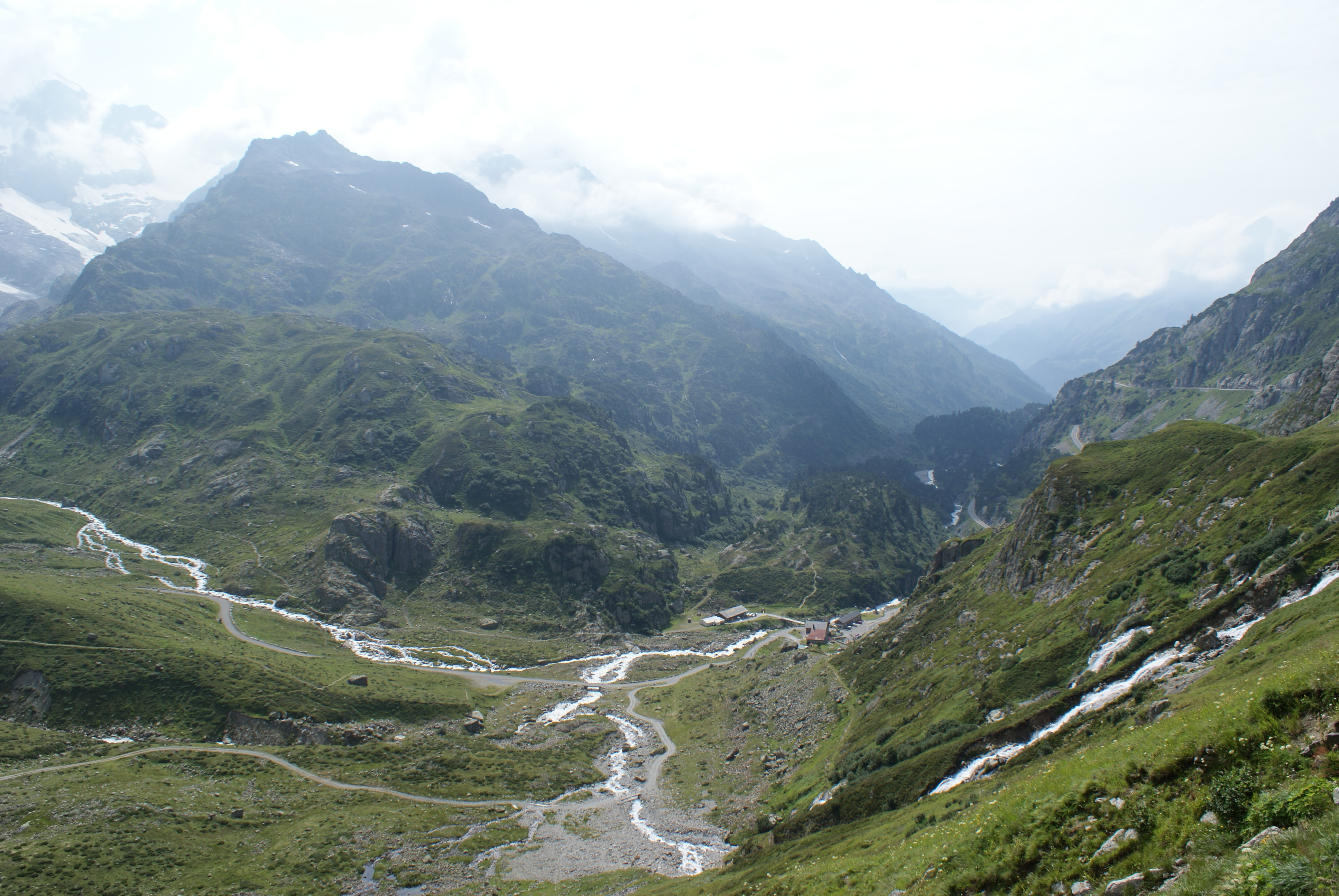 Das Steinwasser (Gemeinde Innertkirchen, Kanton Bern, Schweiz) beim Steinsee am Sustenpass.